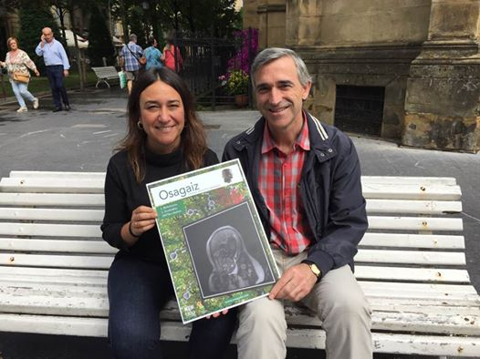 Elezgarai eta Furundarena Osagaiz aldizkariaren aurkezpenean.